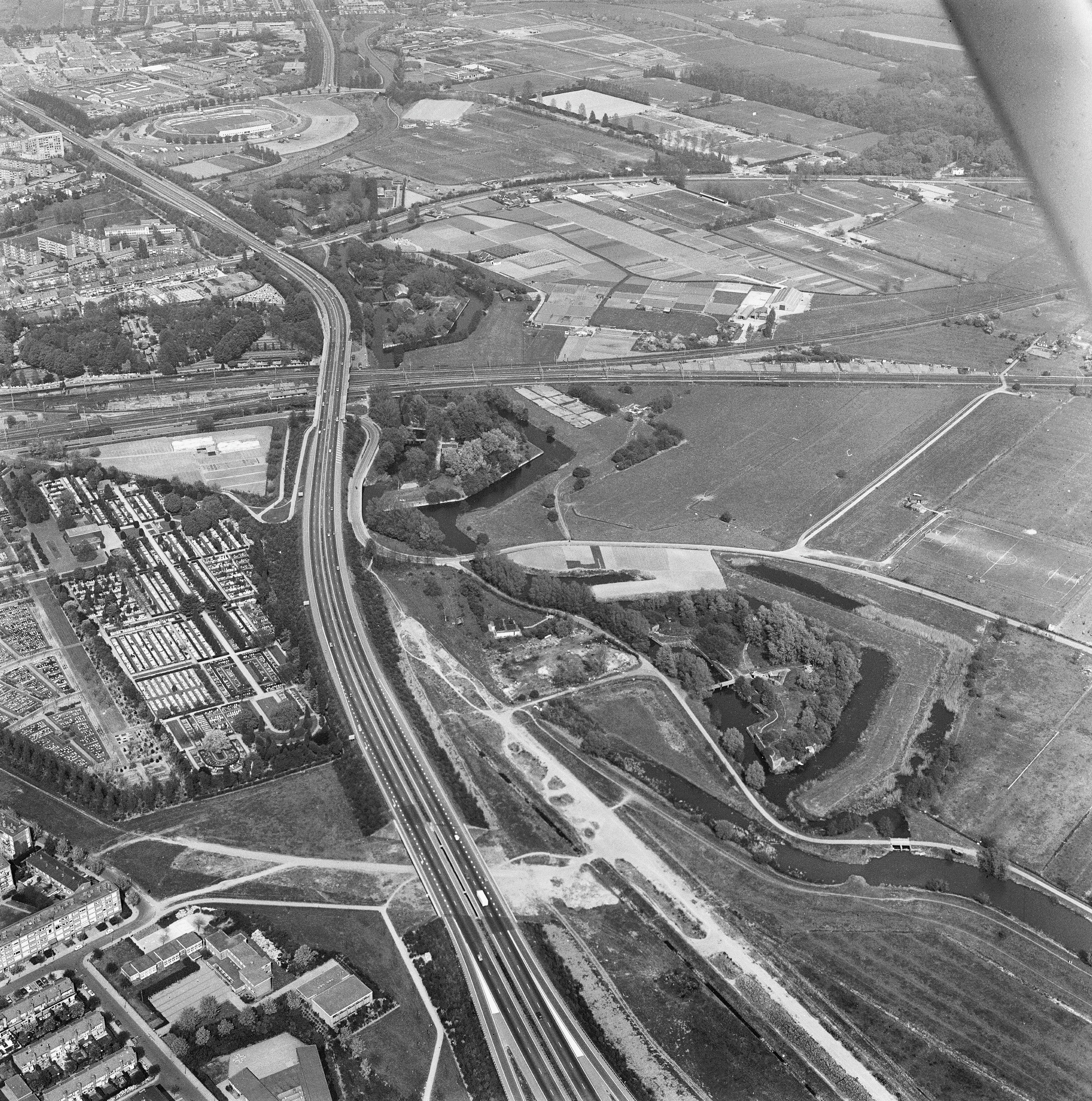 luchtfoto Lunetten I (boven), II, III en IV (onder)